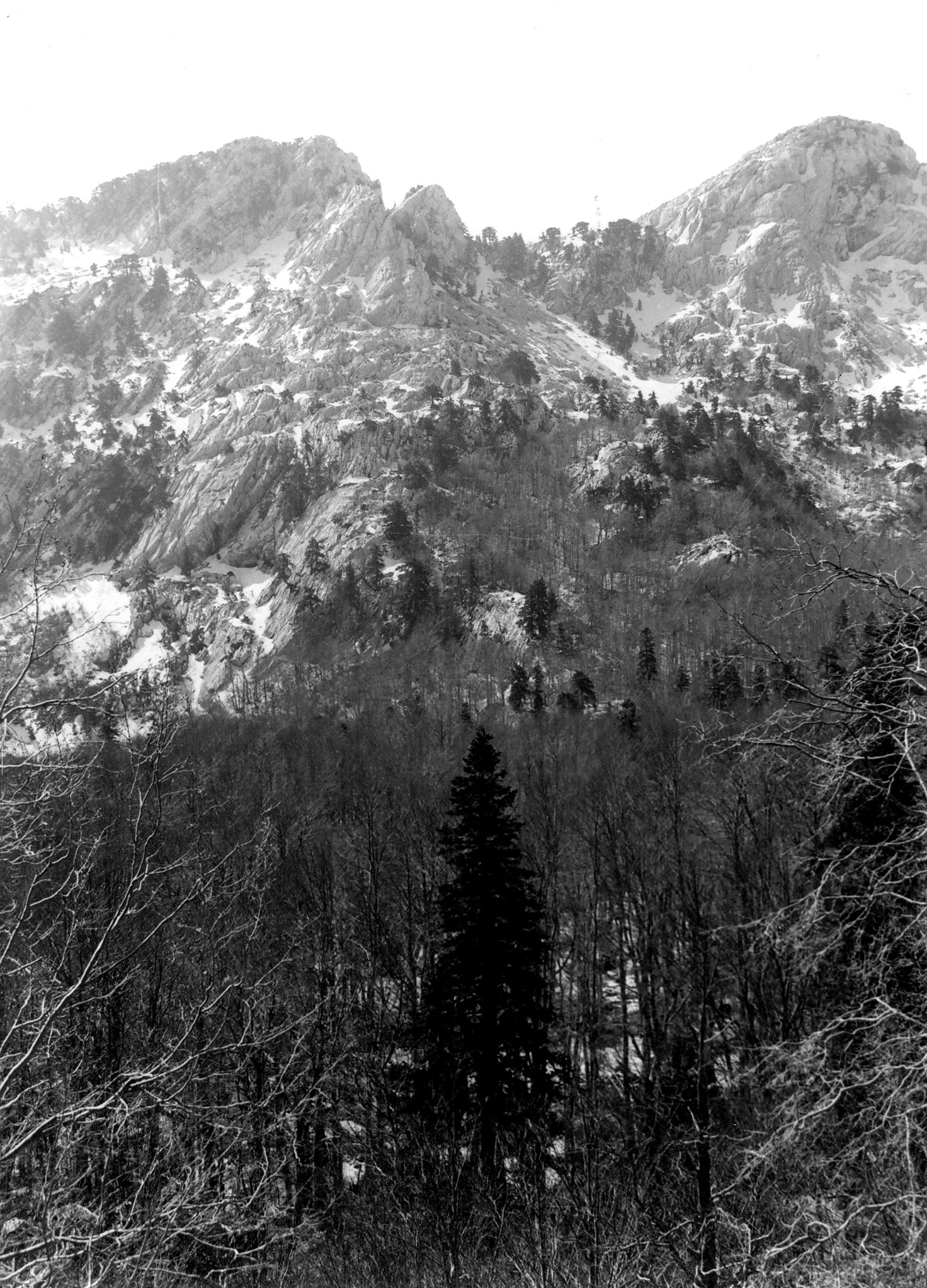 Der Medugorje ist mit 1769 m ein Hauptgipfel der Bijela gora im Orjen